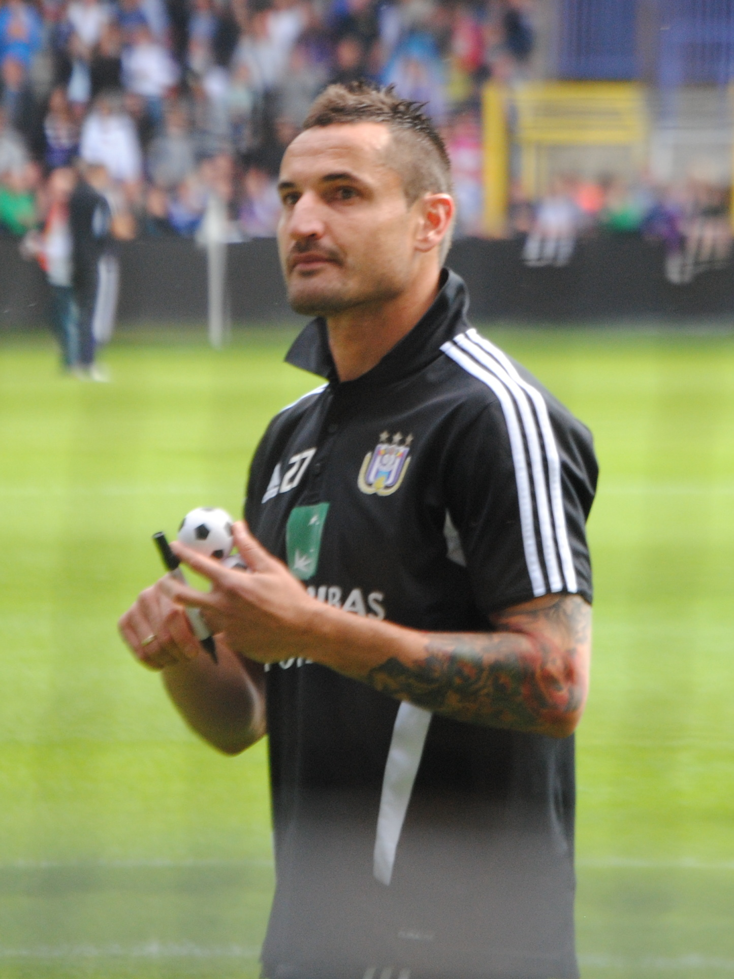 Marcin Wasilewski (Krakau, 9 juni 1980) is een Poolse voetballer die sinds januari 2007 actief is bij de Belgische club RSC Anderlecht.